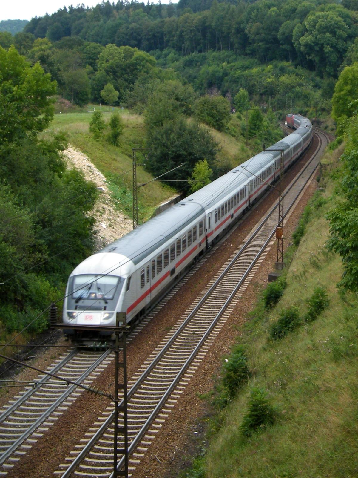 Der EC von Münster nach Klagenfurt geschoben von einer BR 101